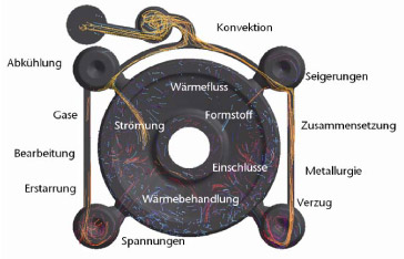 Gießen ist sicherlich das Fertigungsverfahren mit der größten Vielfalt an Variablen. Das macht es für die Simulation umso anspruchs¬voller, alle maßgeblichen Einflussgrößen mit zu berücksichtigen.